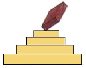 Escudo del municipio de Jantetelco, Morelos.